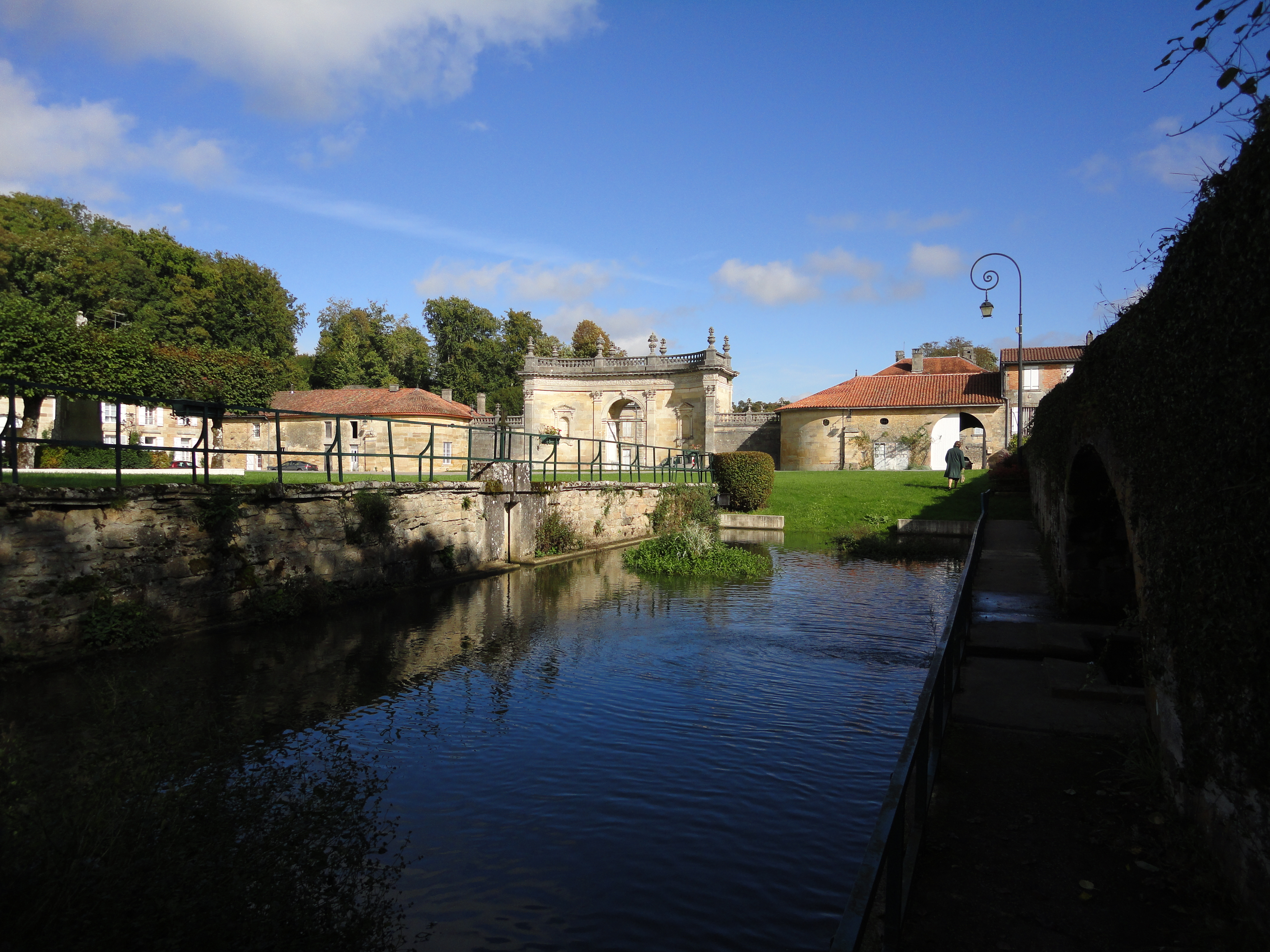 51340 Trois-Fontaines-l'Abbaye, France